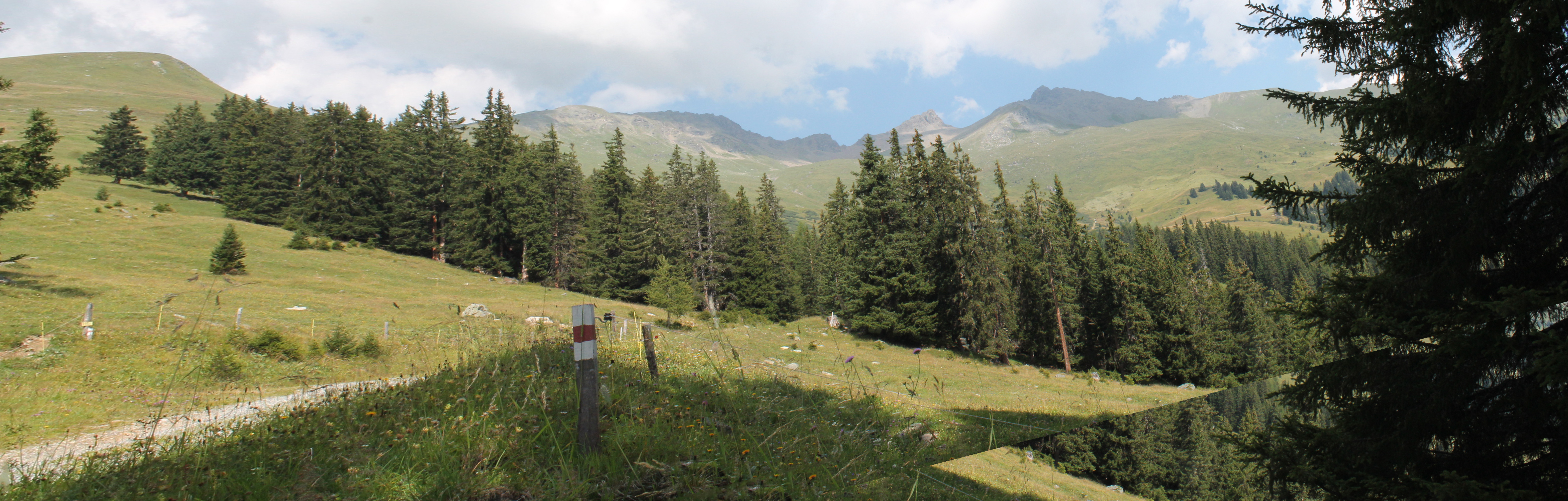 Alpages et montée vers le Fuorclaz Salet au-dessus de Tschlin